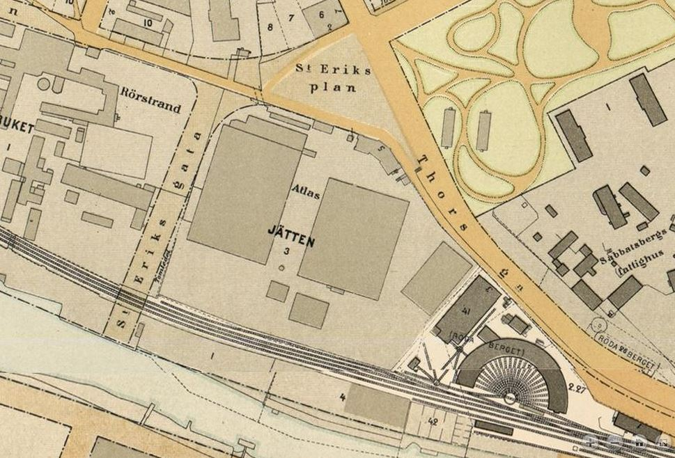 Atlasfabriken på en karta från 1899